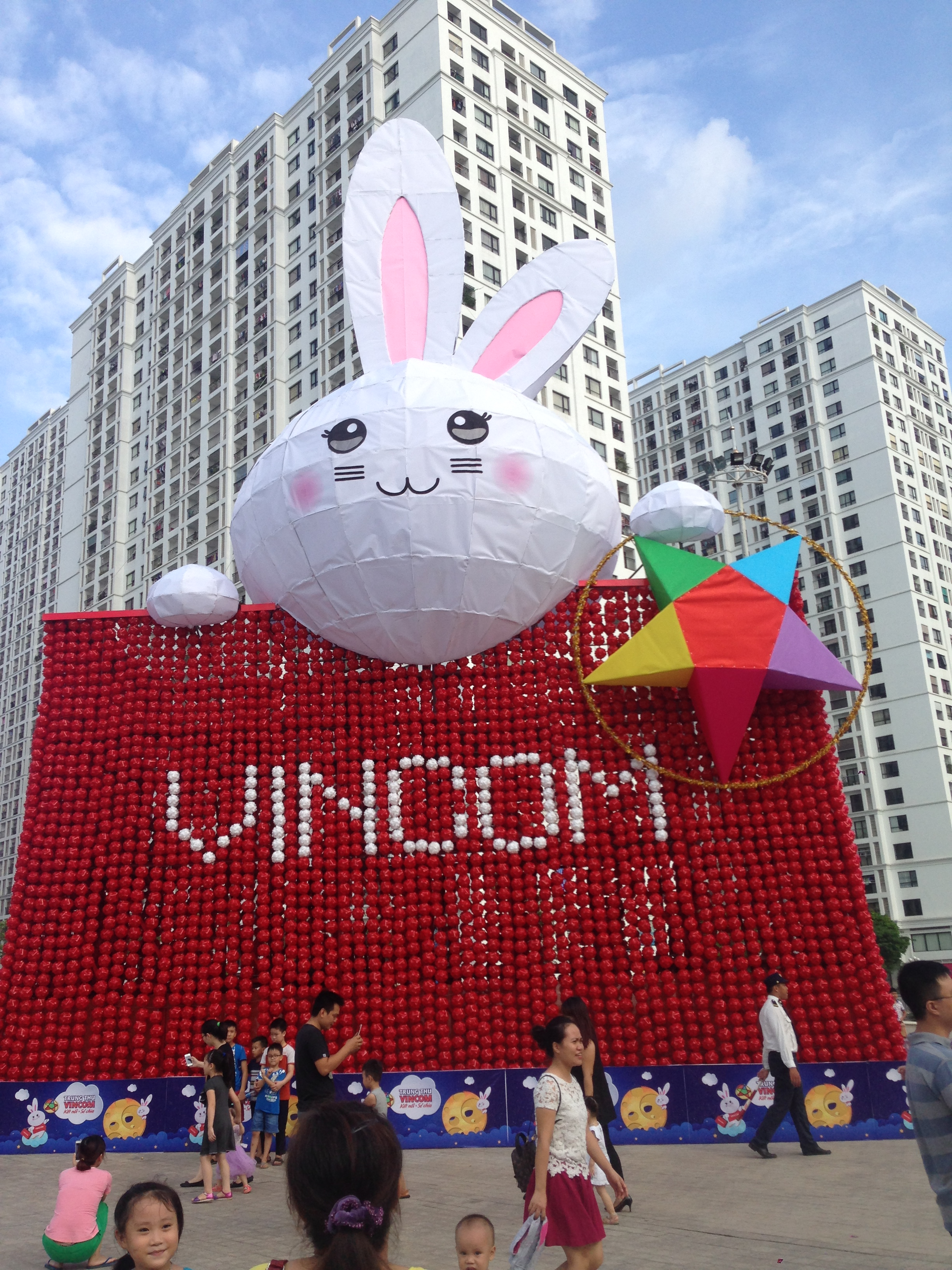 Đèn lồng thỏ khổng lồ đạt kỷ lục Guinness Việt Nam 2016.